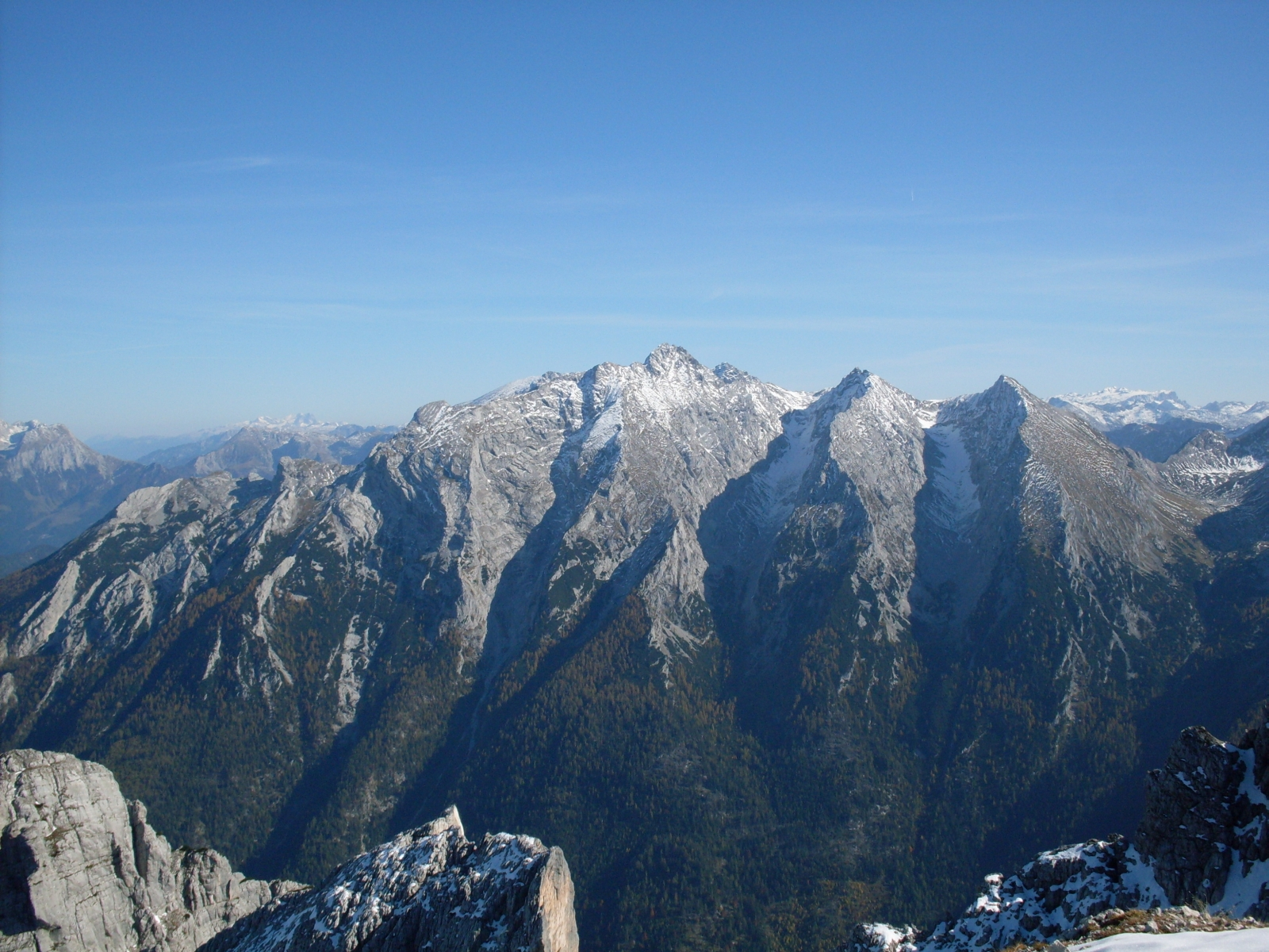 Hochkaltergruppe von Nordwesten (Stadelhorn, Reiter Alm): Hochkalter in der Bildmitte, davon rechts Ofental, Ofentalhörnl, Steintal, Steintalhörnl; rechts davon im Hintergrund der Hochkönig